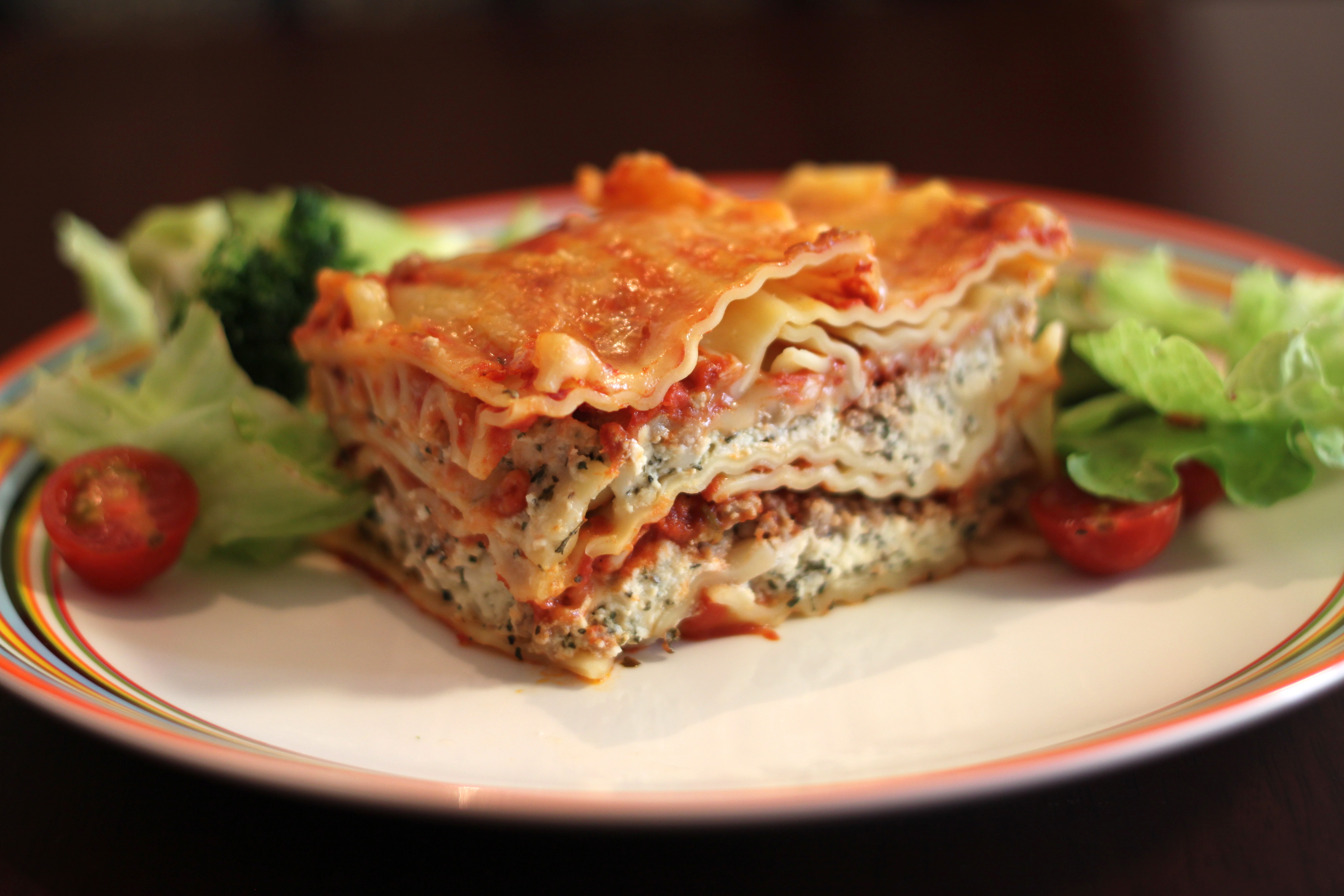 Lasagna with salad.